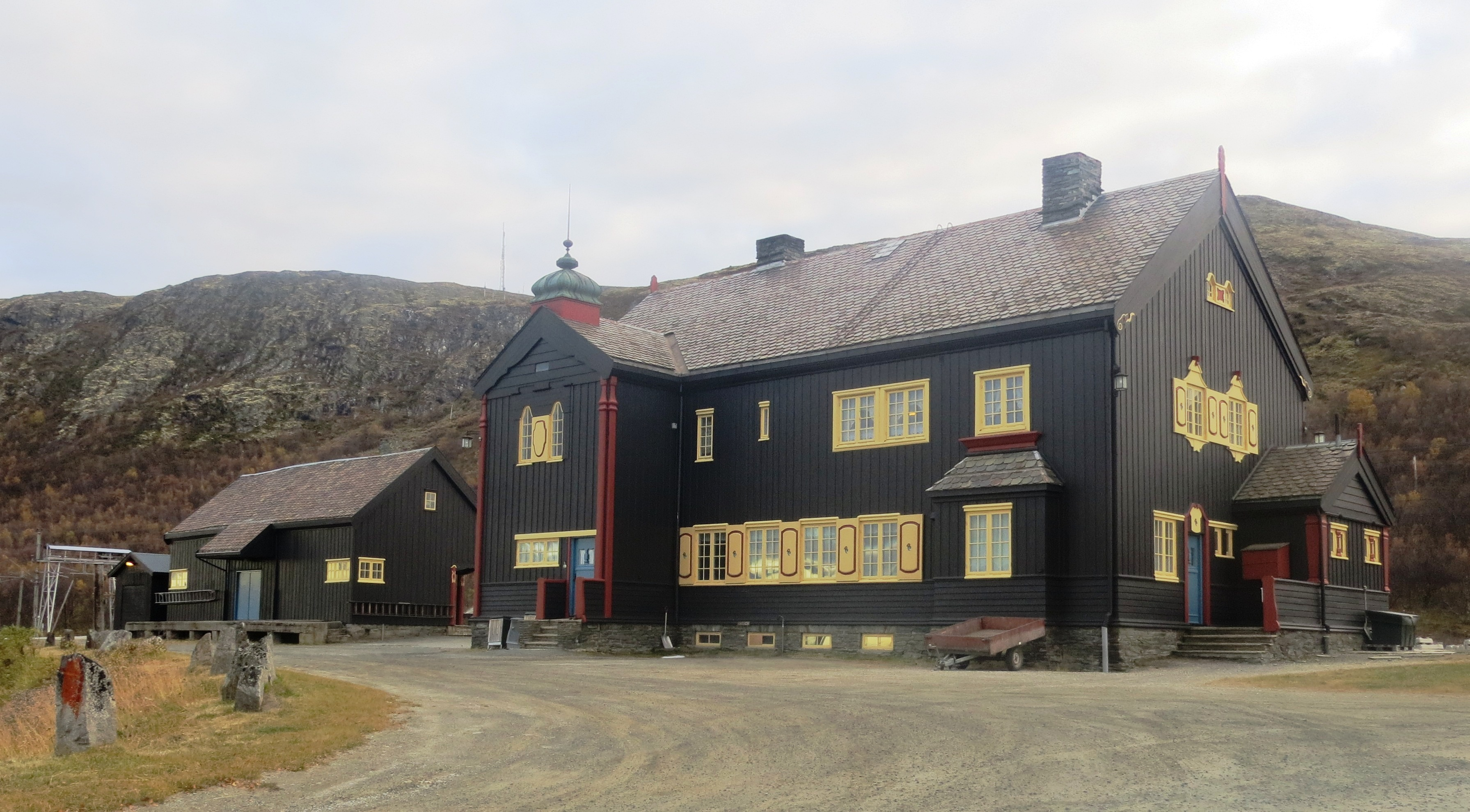 Hjerkinn stasjon, Dovrefjell